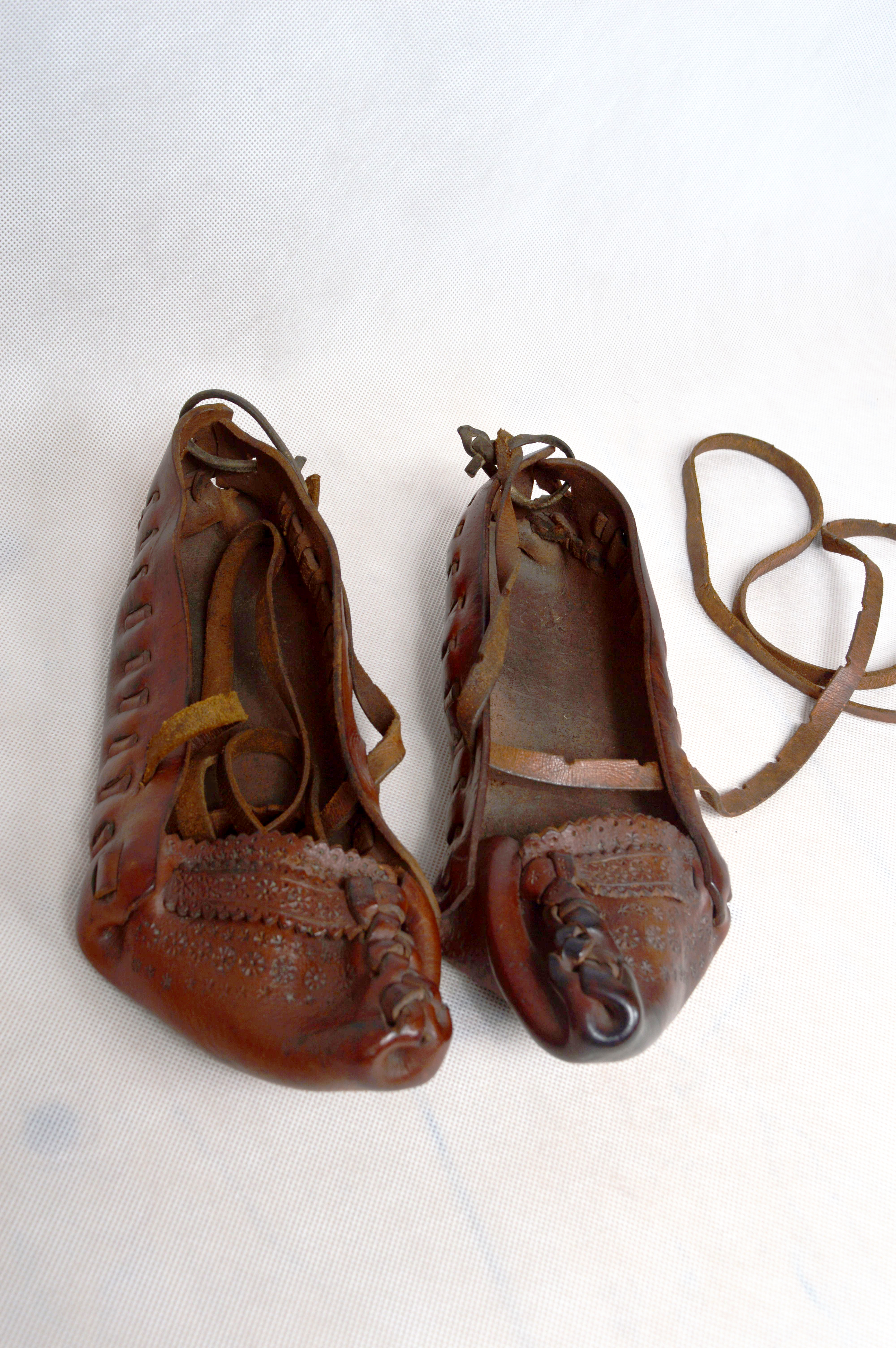 Kierpce men's shoes, XIXth century. Tatra Museum in Zakopane, ethnographic collection.